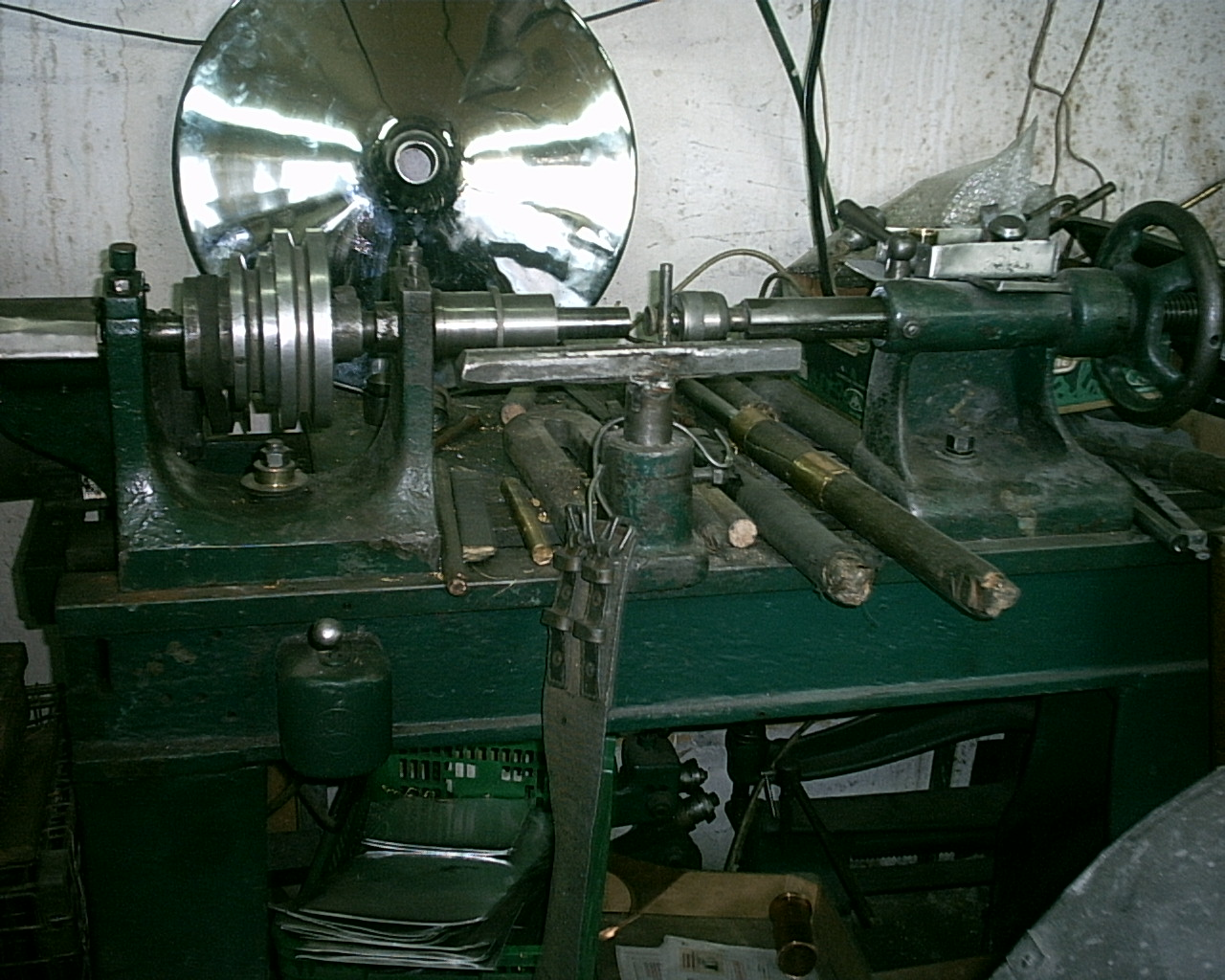 Wyoblarka ręczna, , użycie za podaniem autorstwa (Creative Commons CC-BY 2.5)